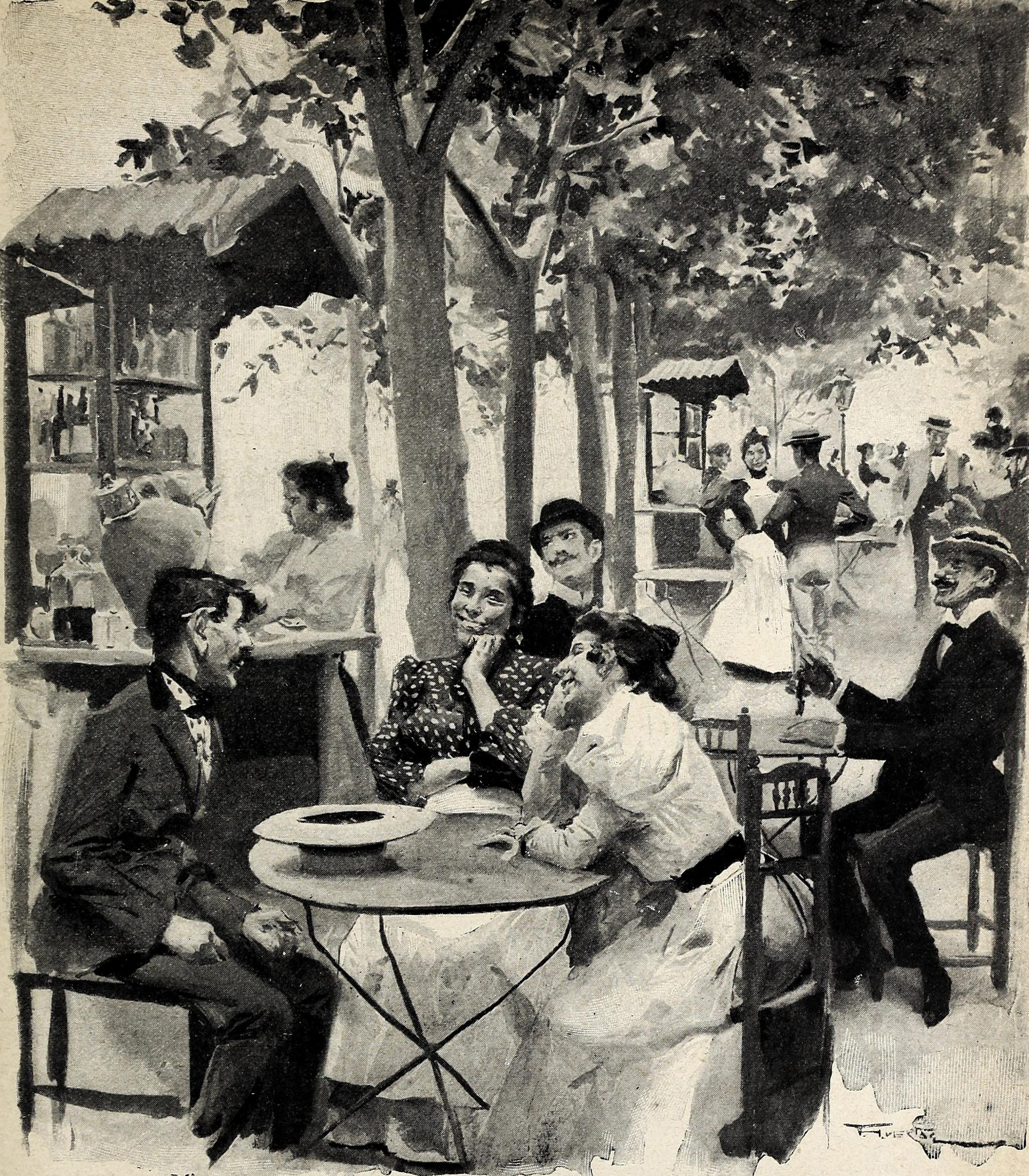 El puesto de agua.